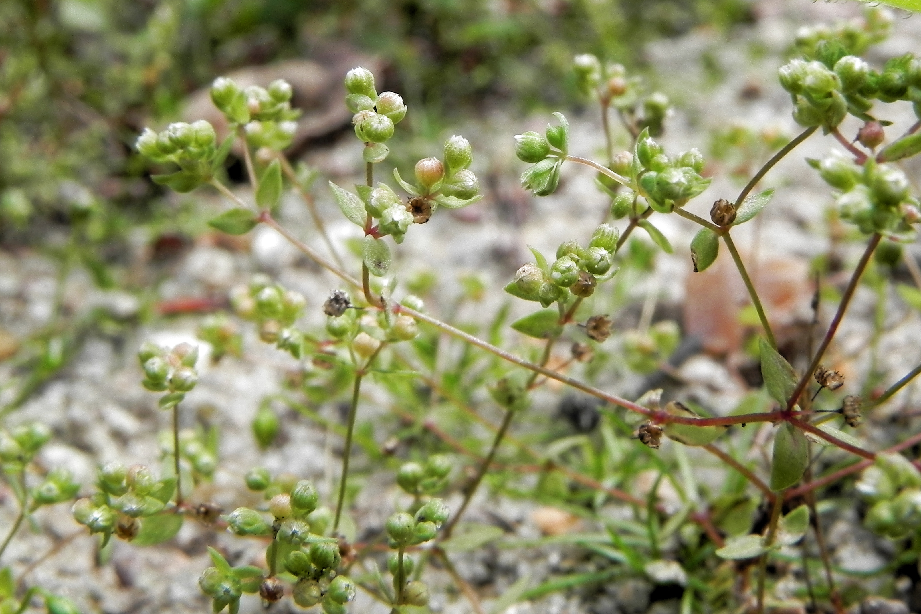 Zwerglein (radiola linoides) im Naturpark Südheide (Germany)